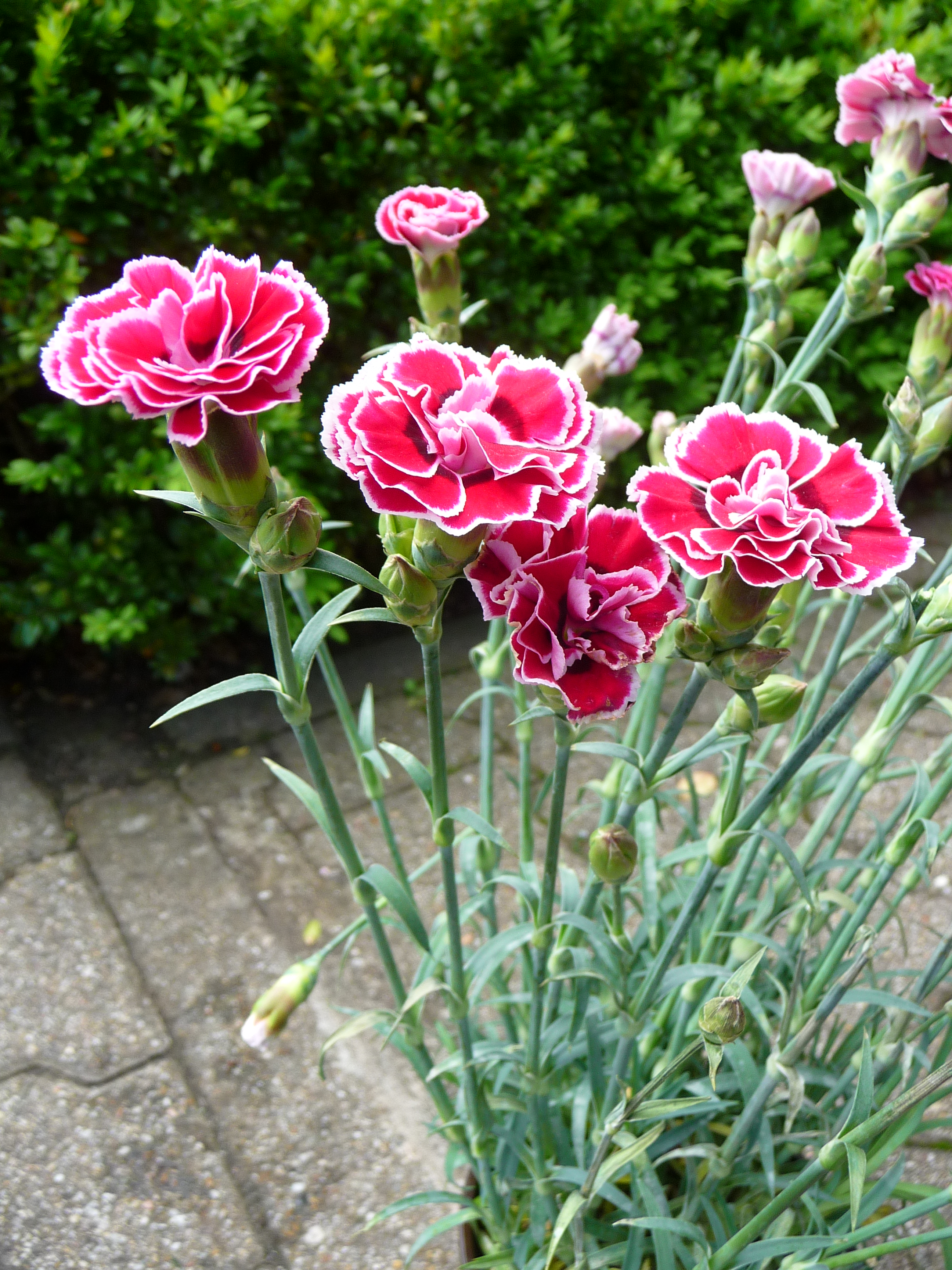 Landnelke Mondrian (Dianthus caryophyllus), fotografiert in Heidelberg (Baden-Württemberg, Deutschland)